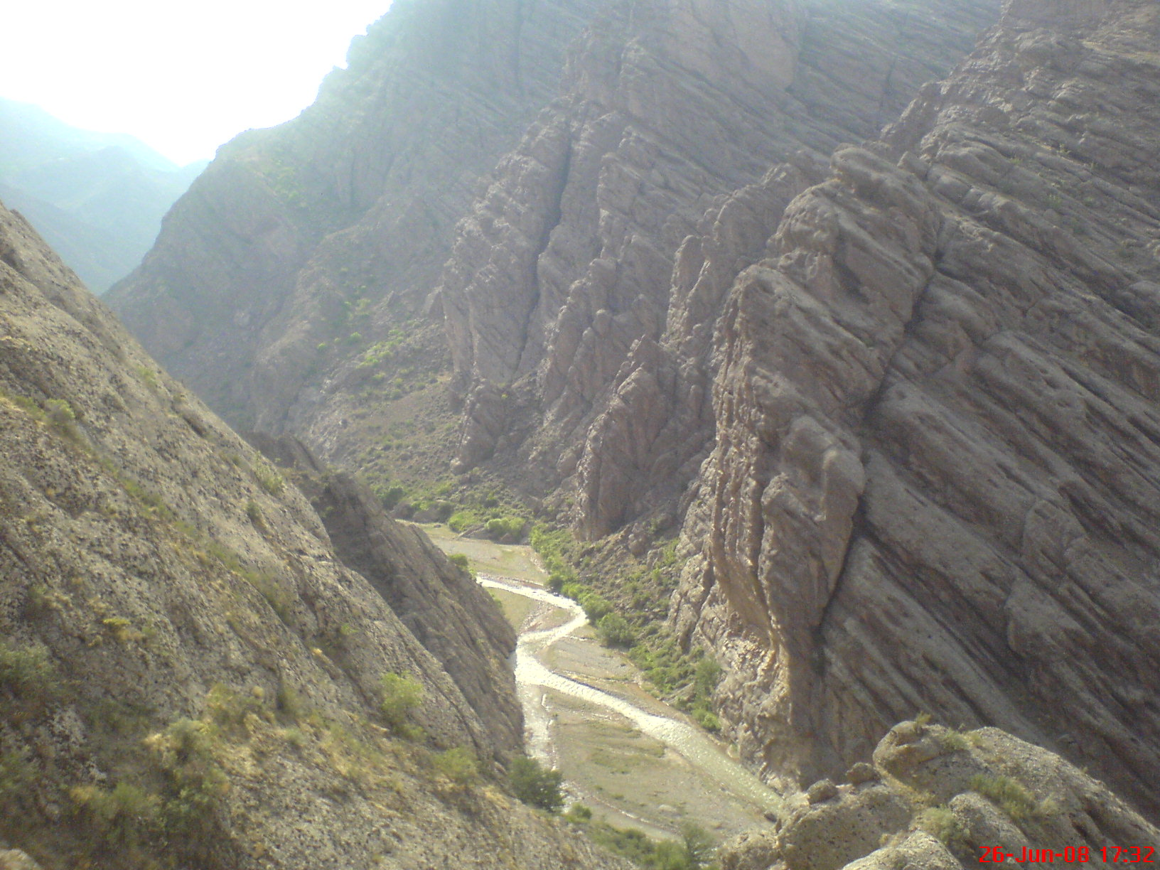 shirkooh (شیر کوه )